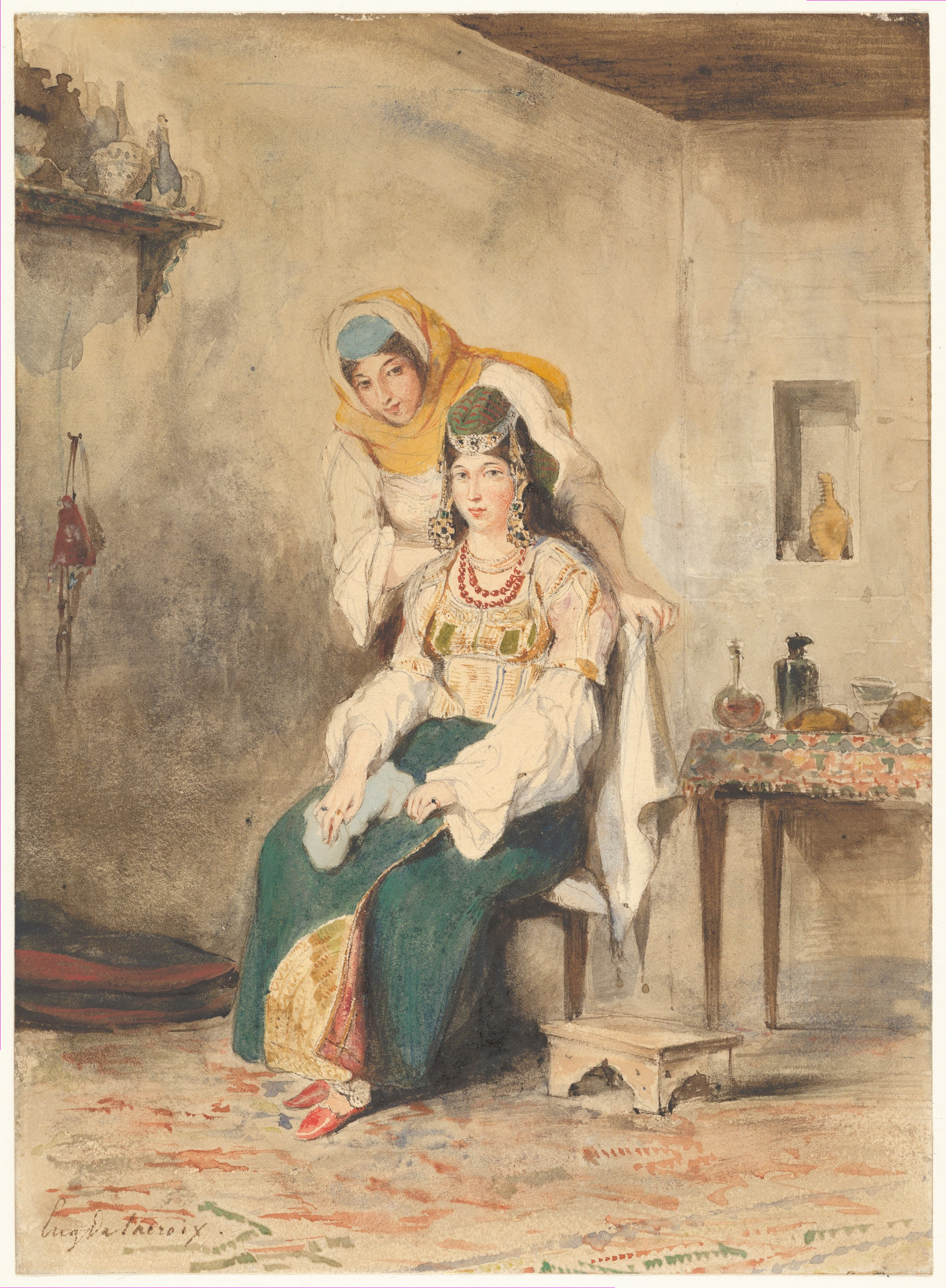 Drawing; Drawings